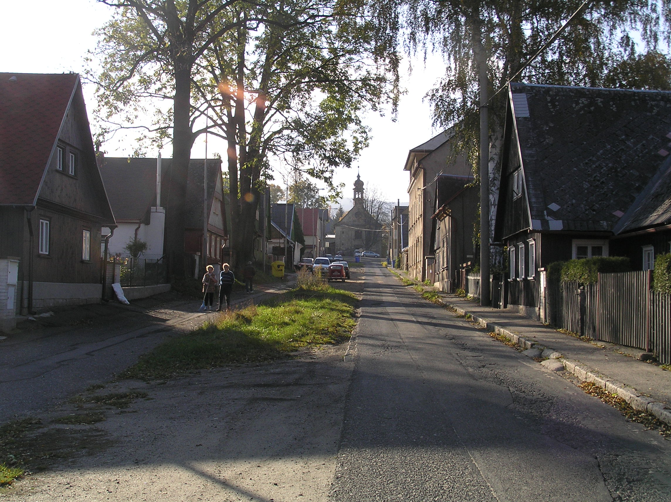 Liberec-Janův Důl - Volgogradská ulice